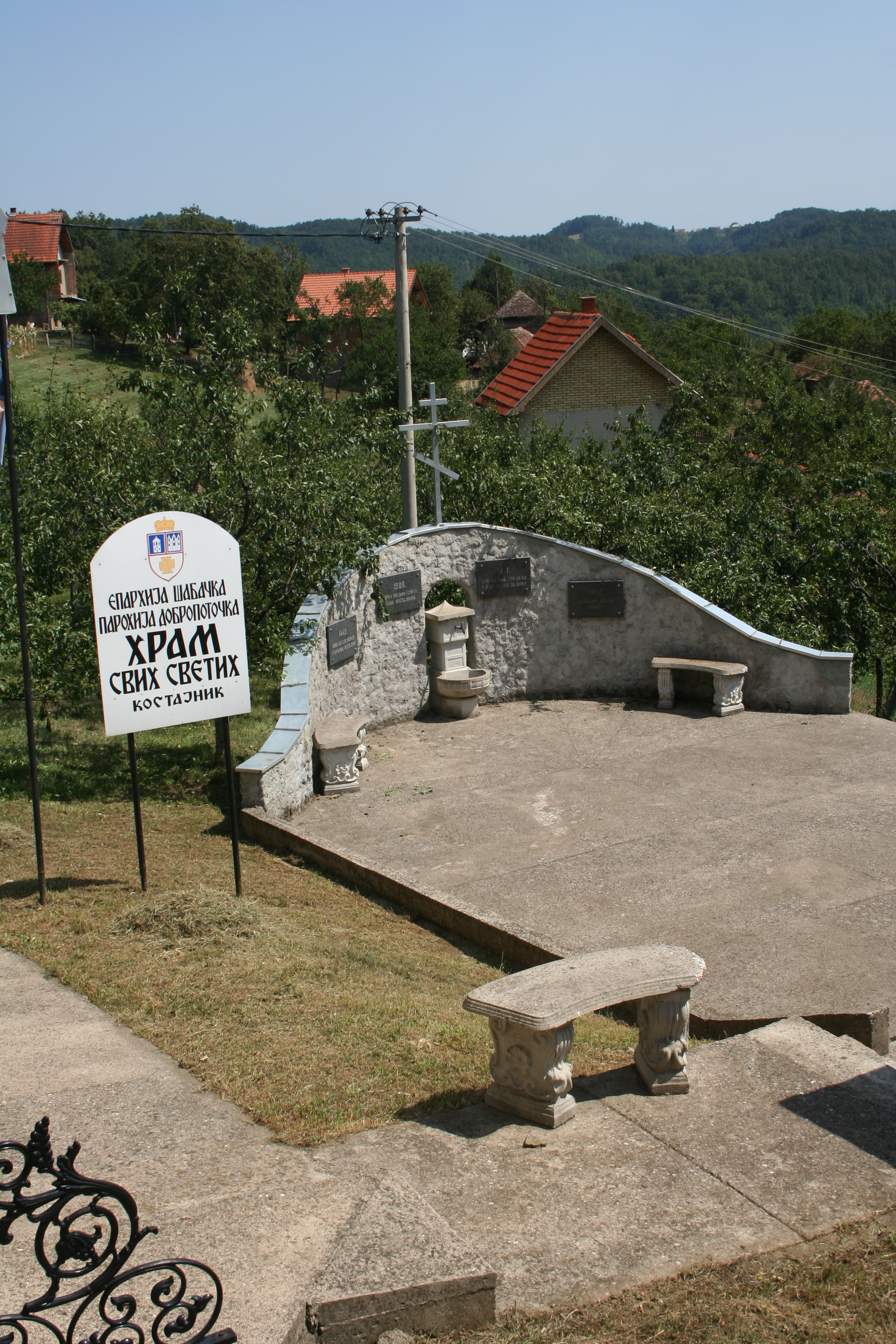 Crkva svih Svetih, Kostajnik